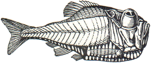 Silberbeil